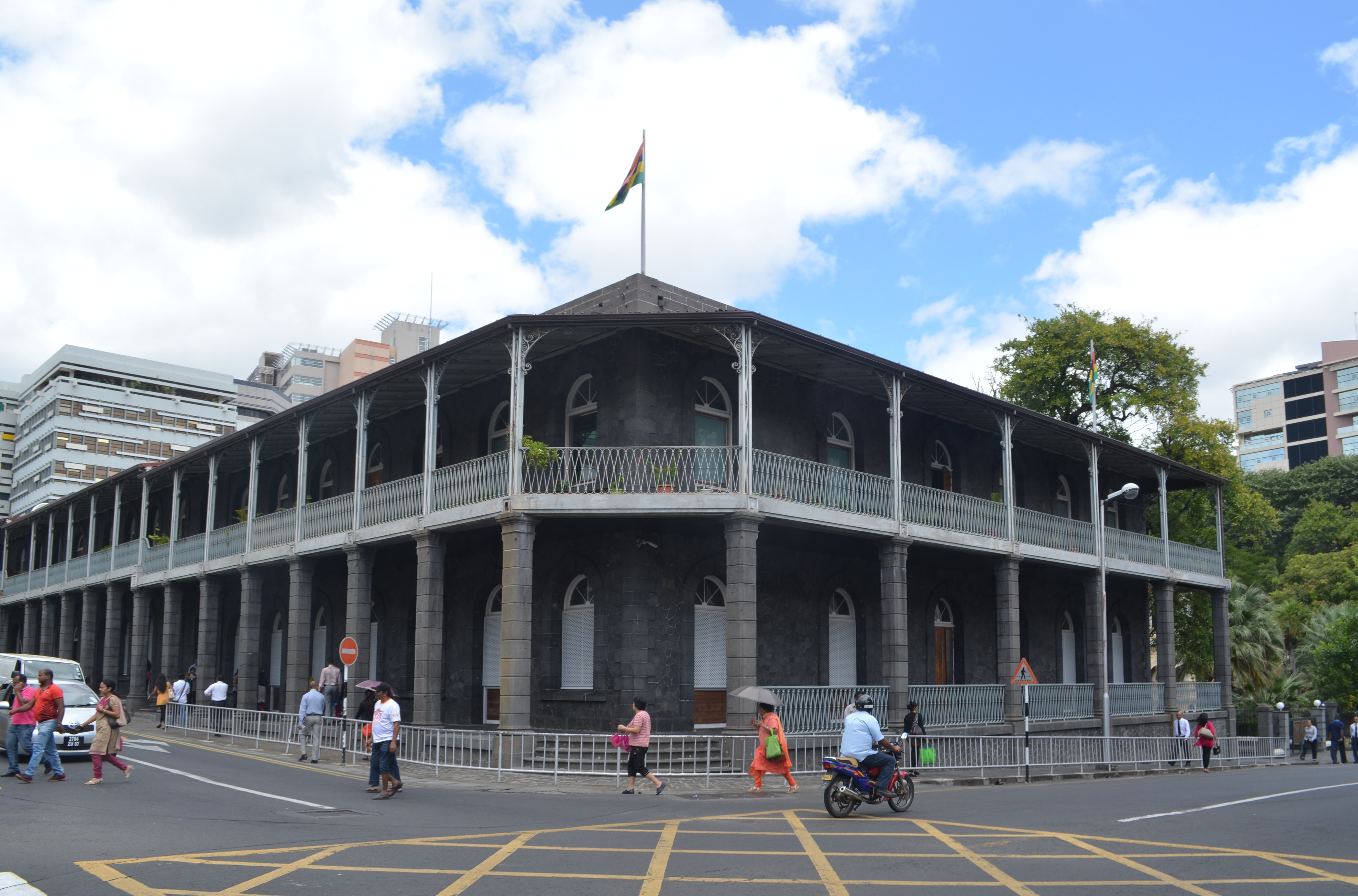 Port Louis, Building of the Prime Minister